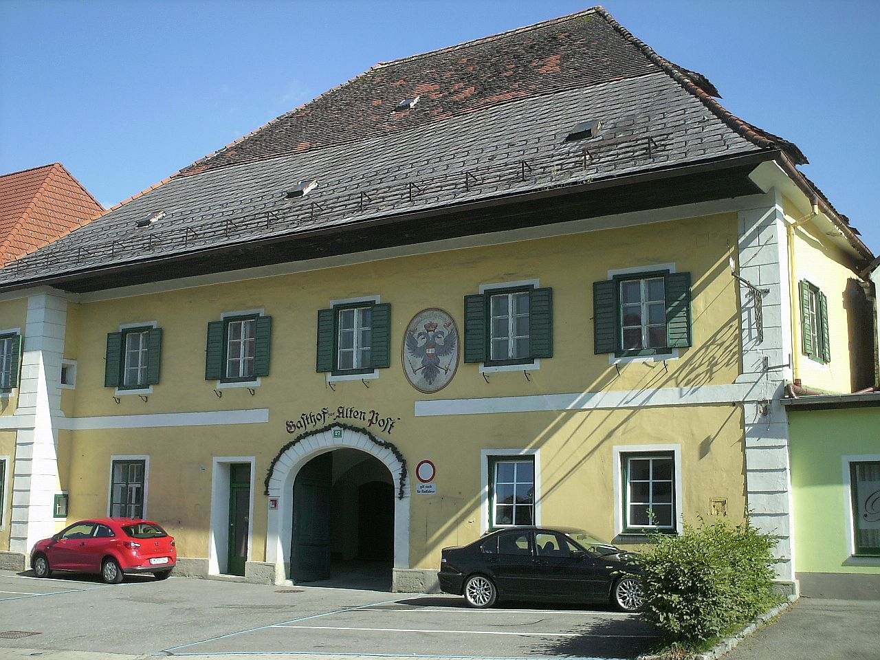 Gasthaus Alte Post in Krieglach/Österreich.